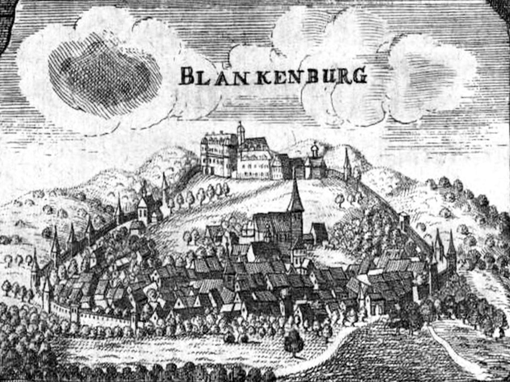 Kupferstich von Stadt und Schloss Blankenburg von 1708 oder früher